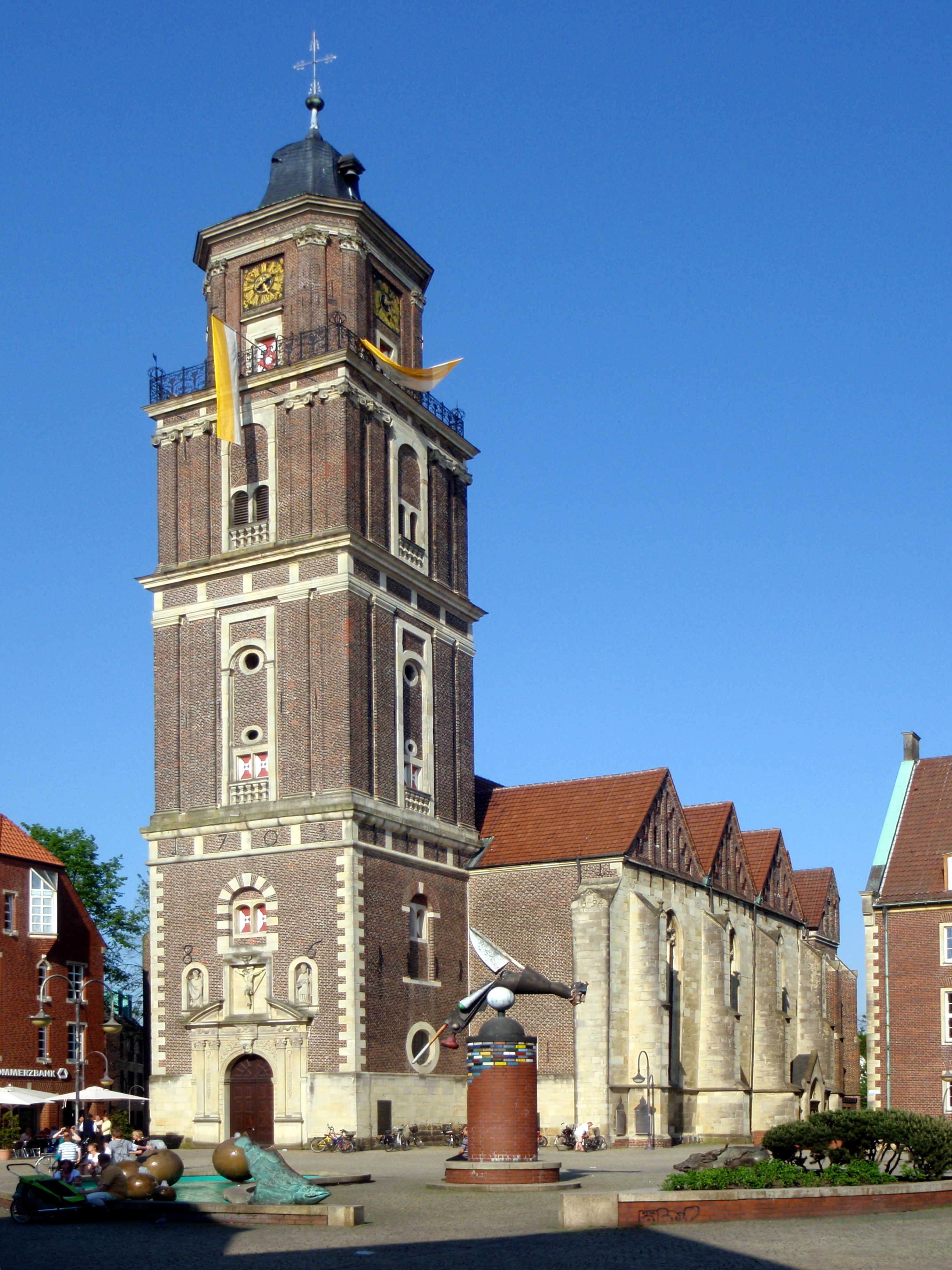 Die katholische Pfarrkirche St. Lamberti am Marktplatz in Coesfeld.